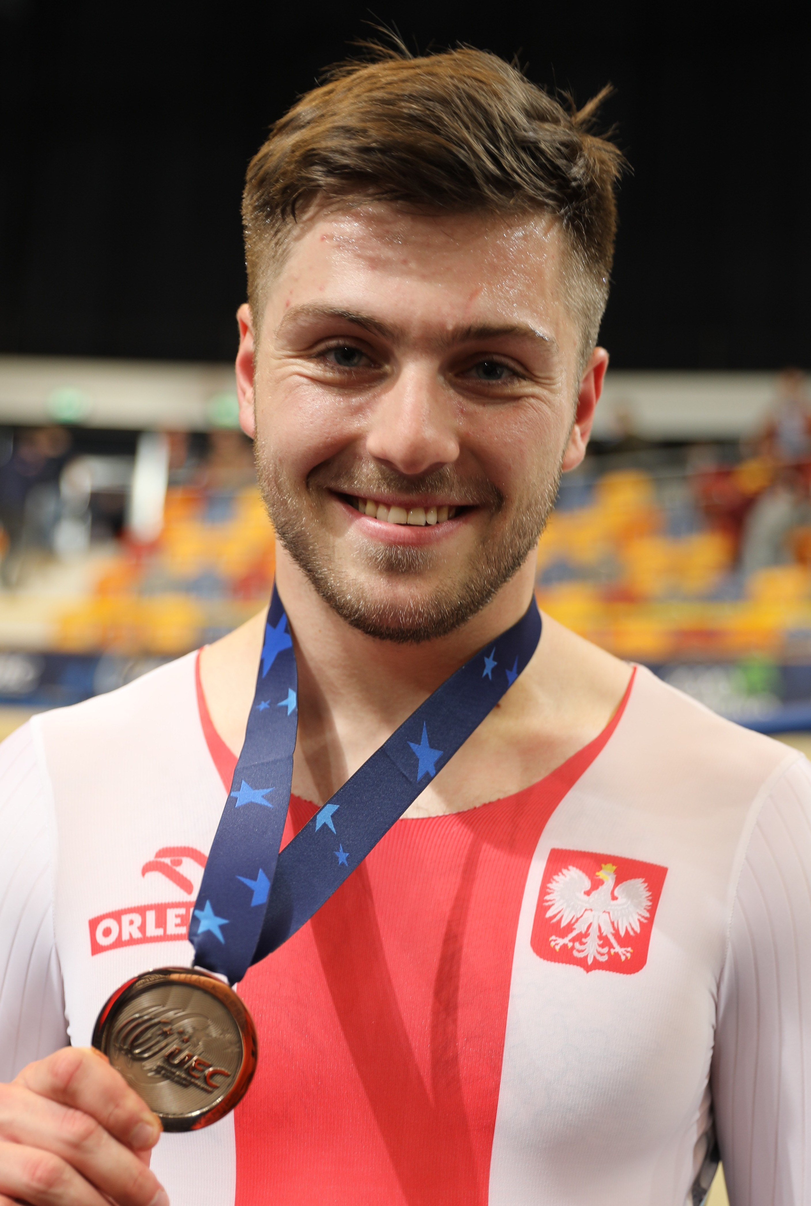 Mateusz Rudyk, polnischer Radsportler - EM-Bronze im Sprint